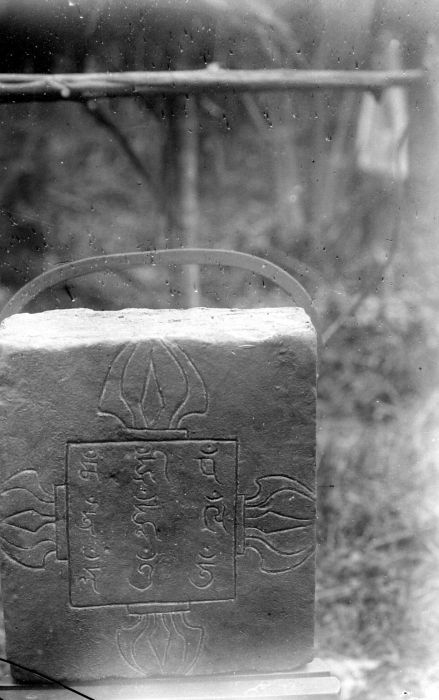 Negatief. Een steen met inscripties uit de Candi Bungsu op het tempelcomplex Candi Muara Takus